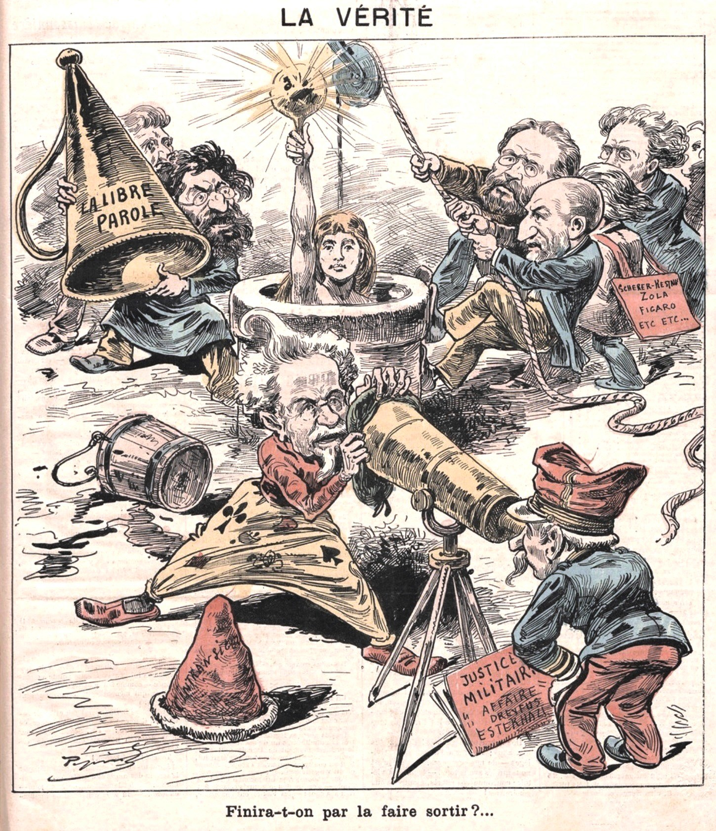 "La Vérité".